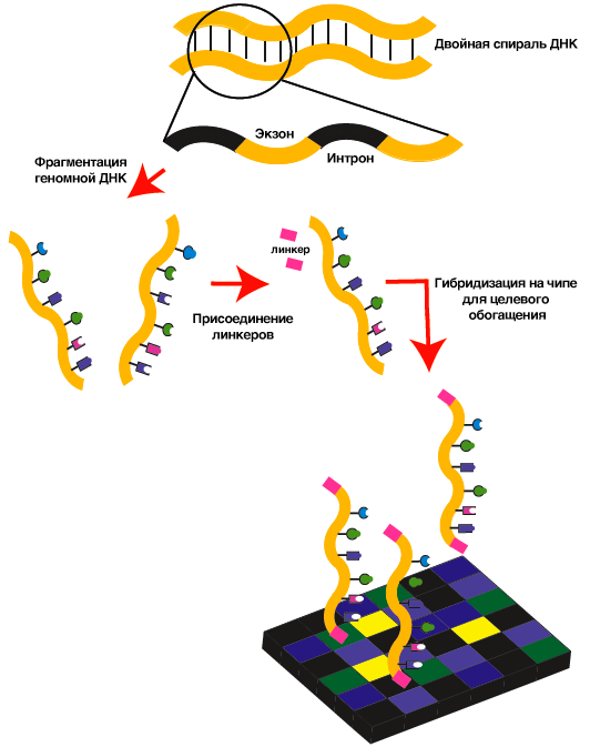 схема экзомного секвенирования с подписями на русском языке, часть 1